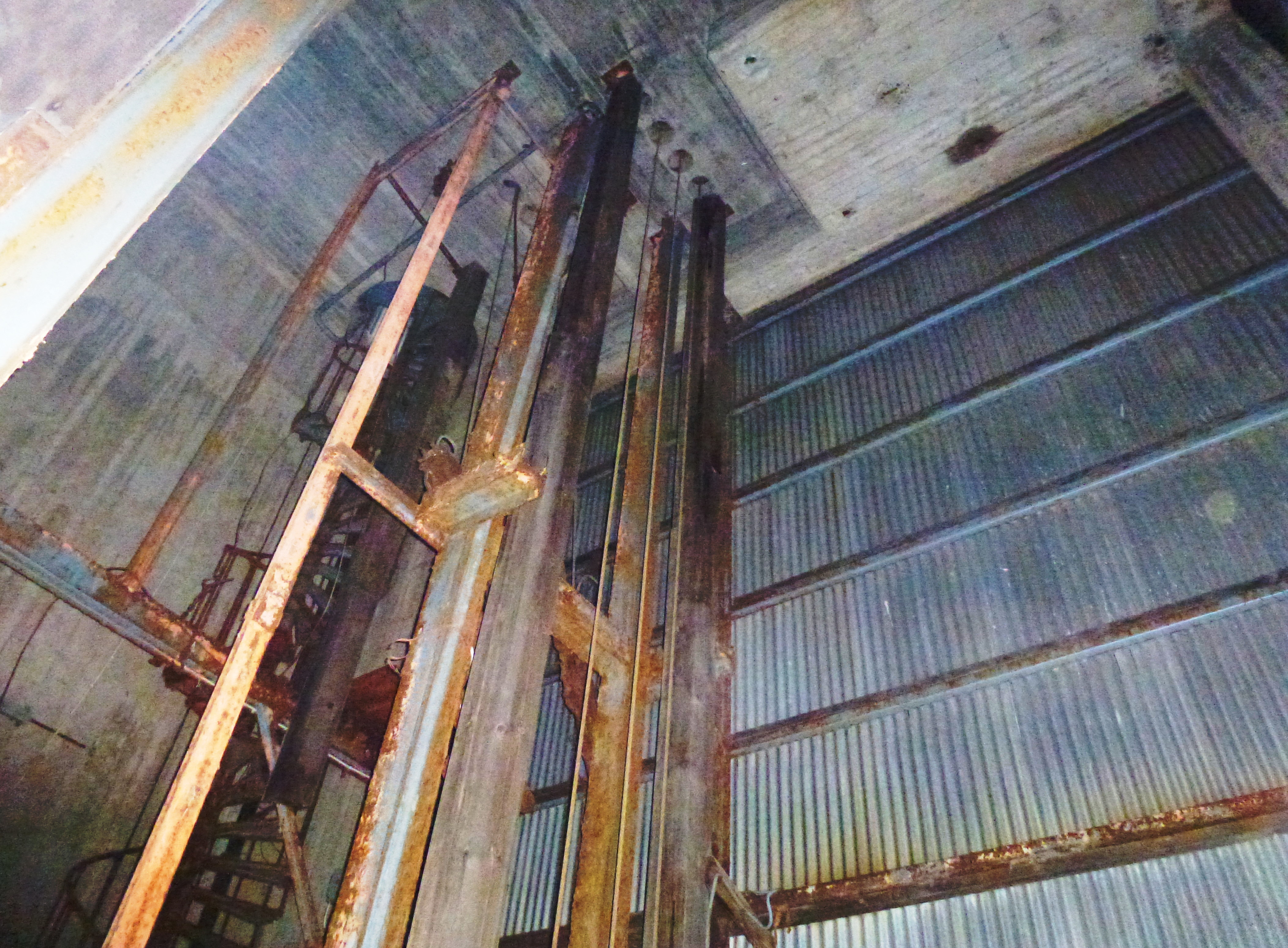 Källbottens gruva, laven